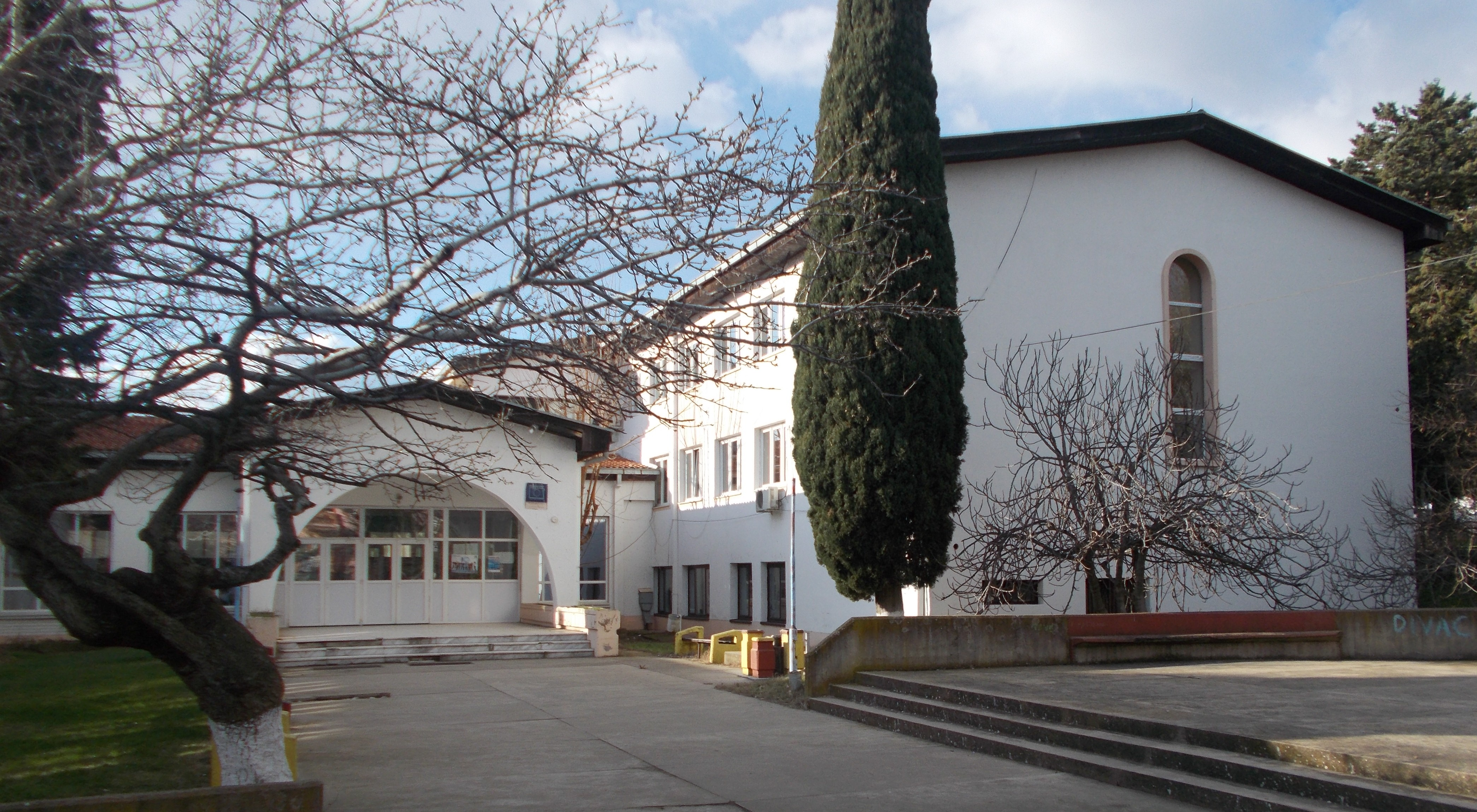 СОУ „Гоце Делчев“ - Валандово